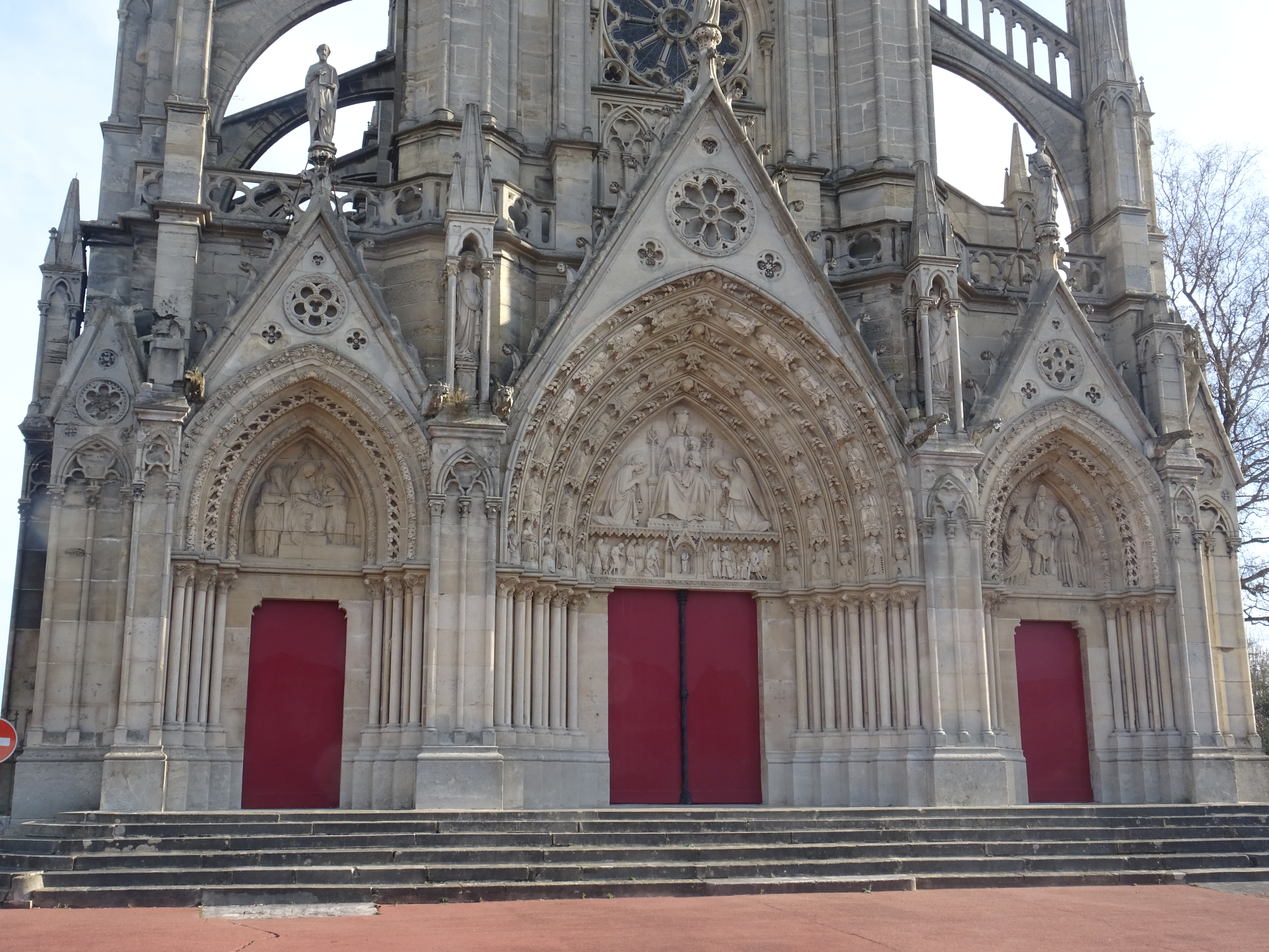 Bonsecours (Seine-Maritime, France) : portails occidentaux de la basilique Notre-Dame de Bonsecours